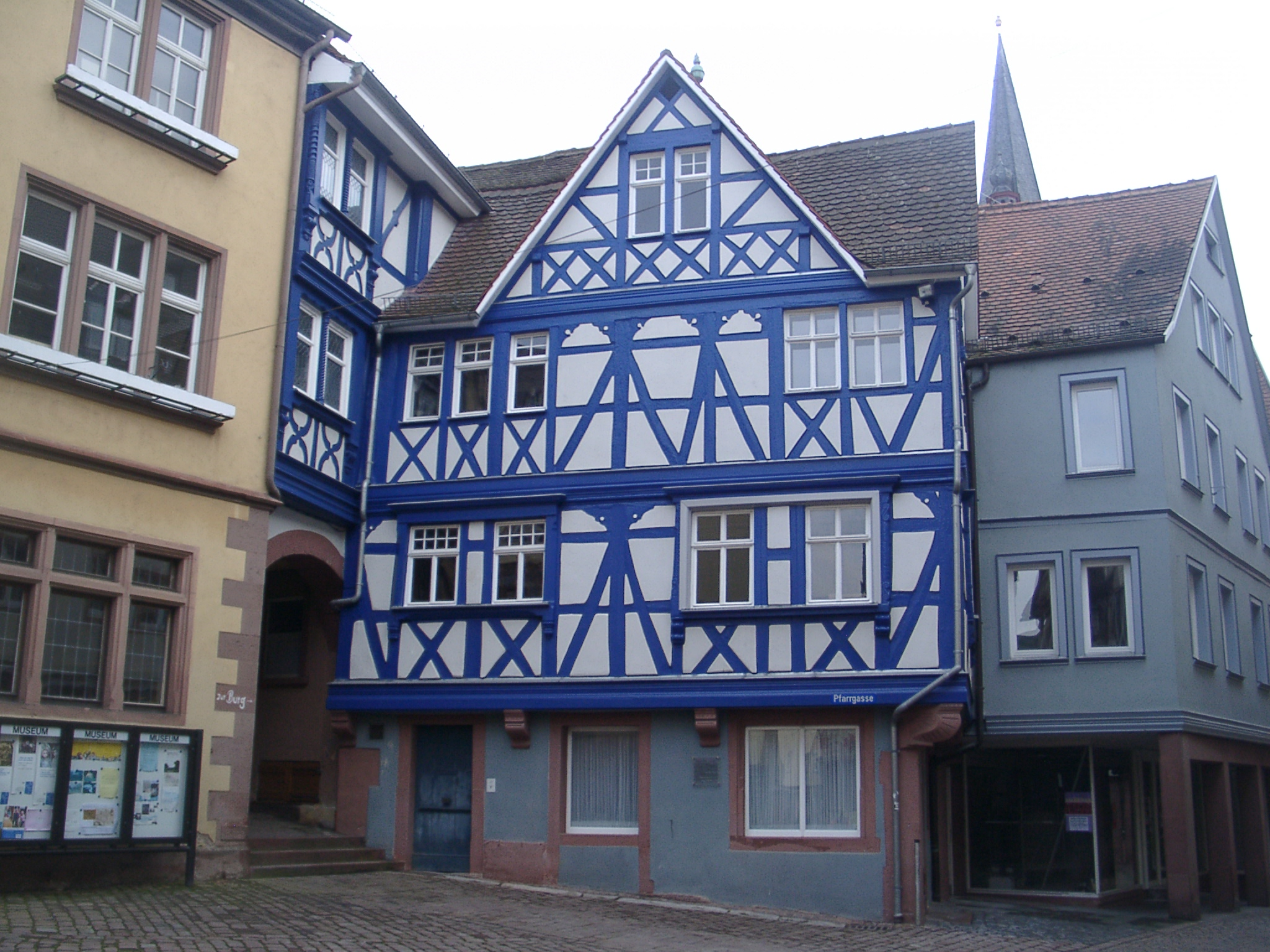 Fachwerkhaus mit Smalte-Blau in Wertheim, Pfarrgasse